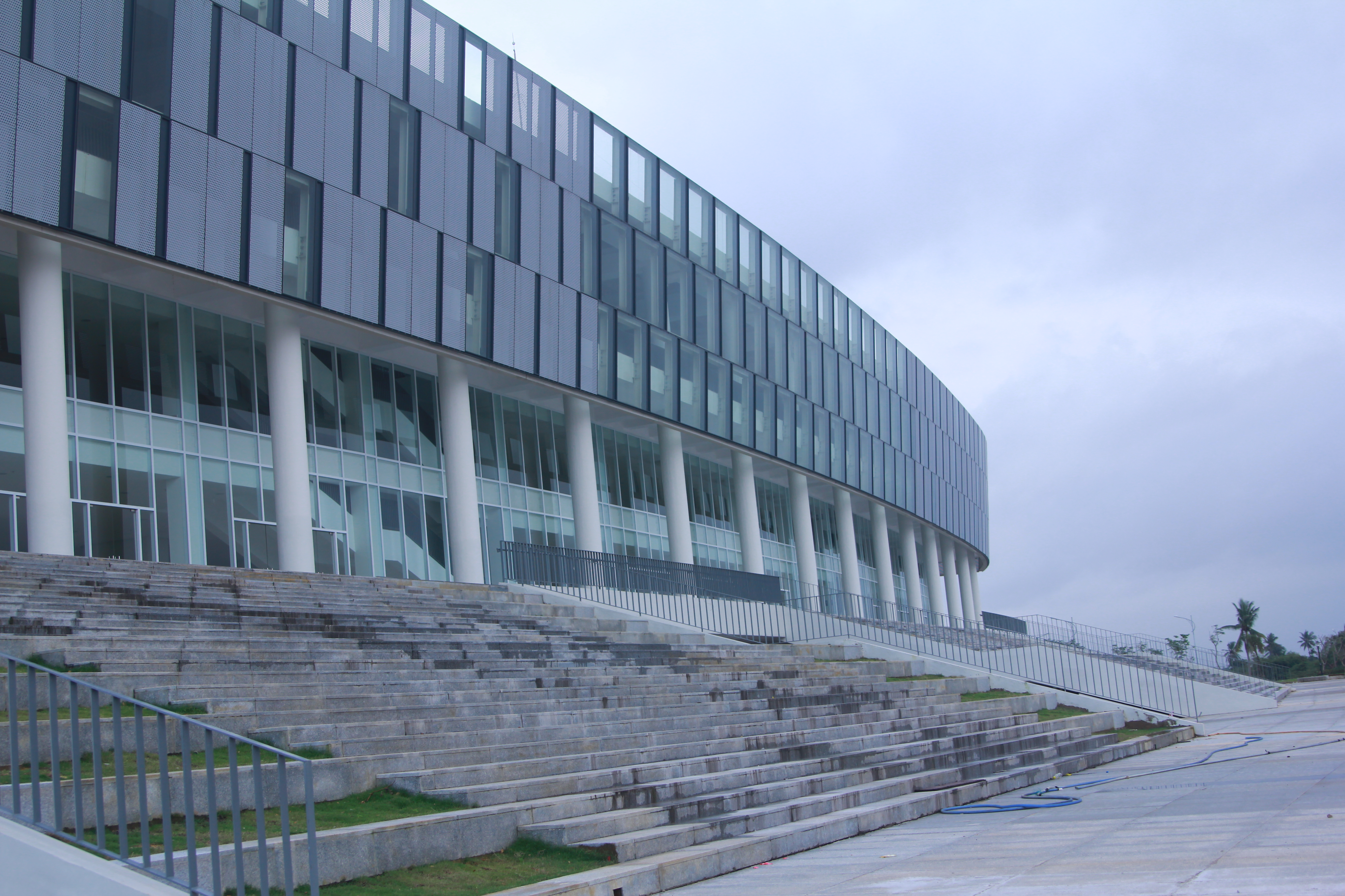 San hoa xuan 2